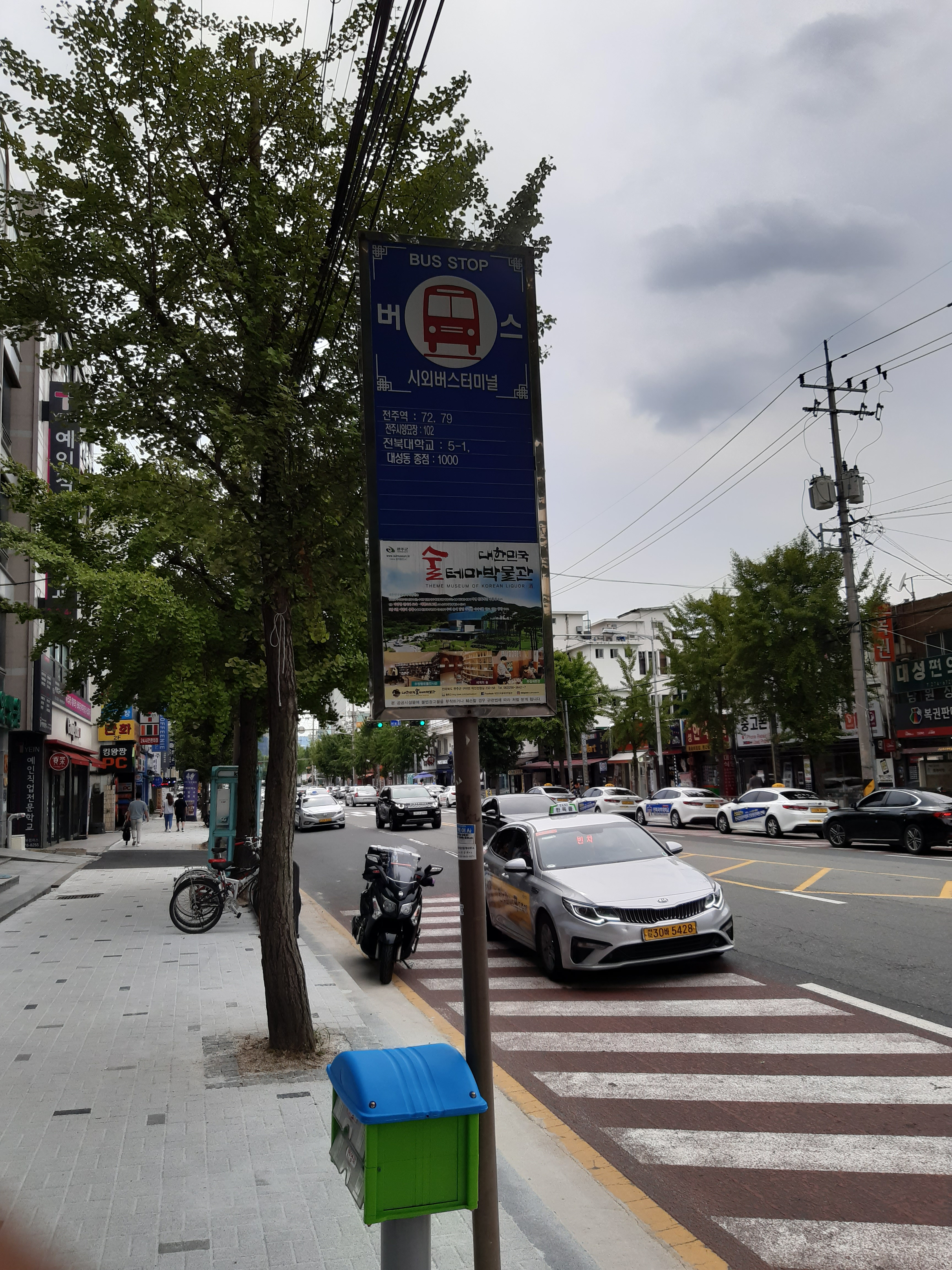 전라북도 전주의 버스 정류장